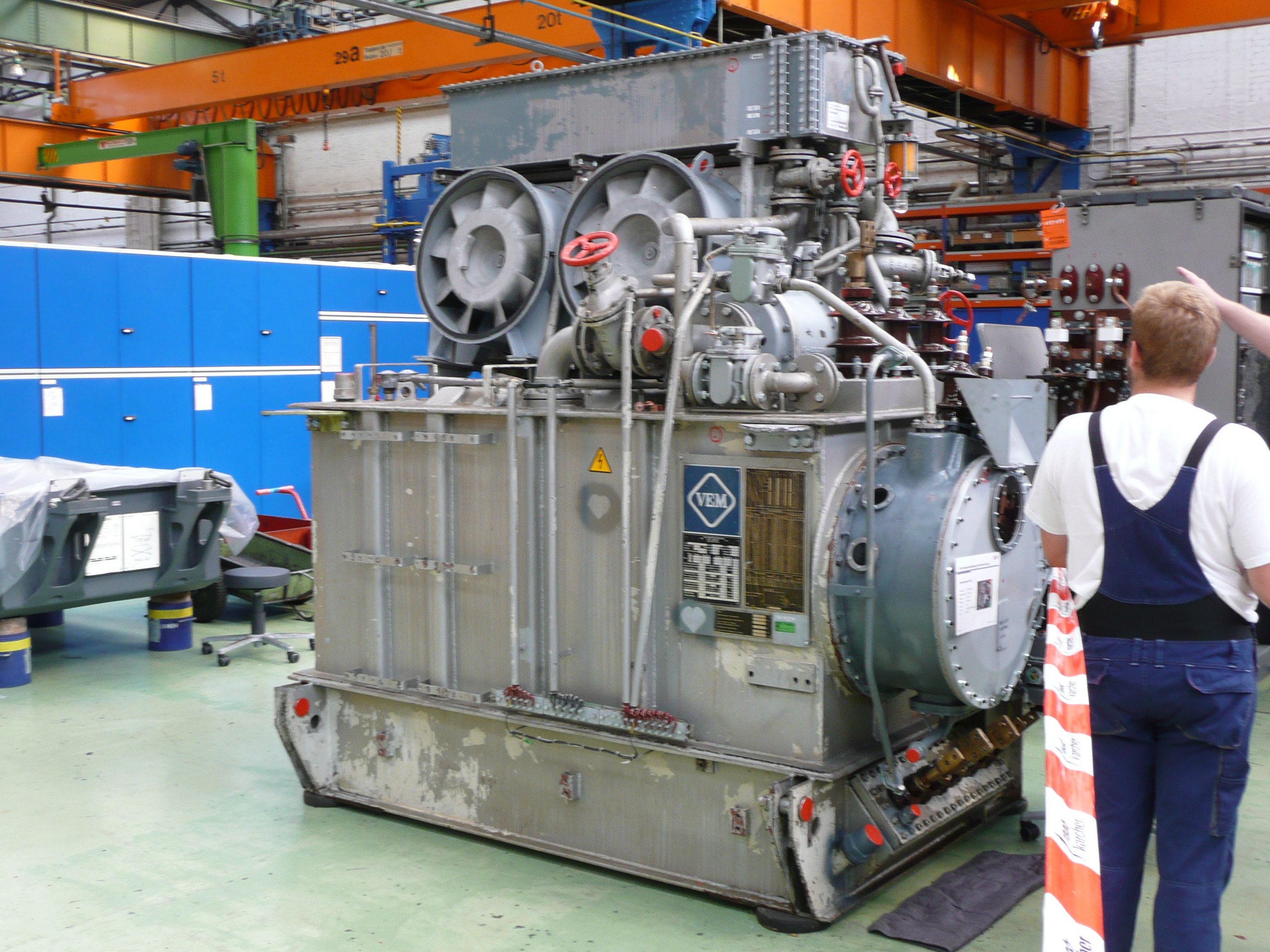 Transformator der Br 155 in der Trafowerkstatt des AW Dessau